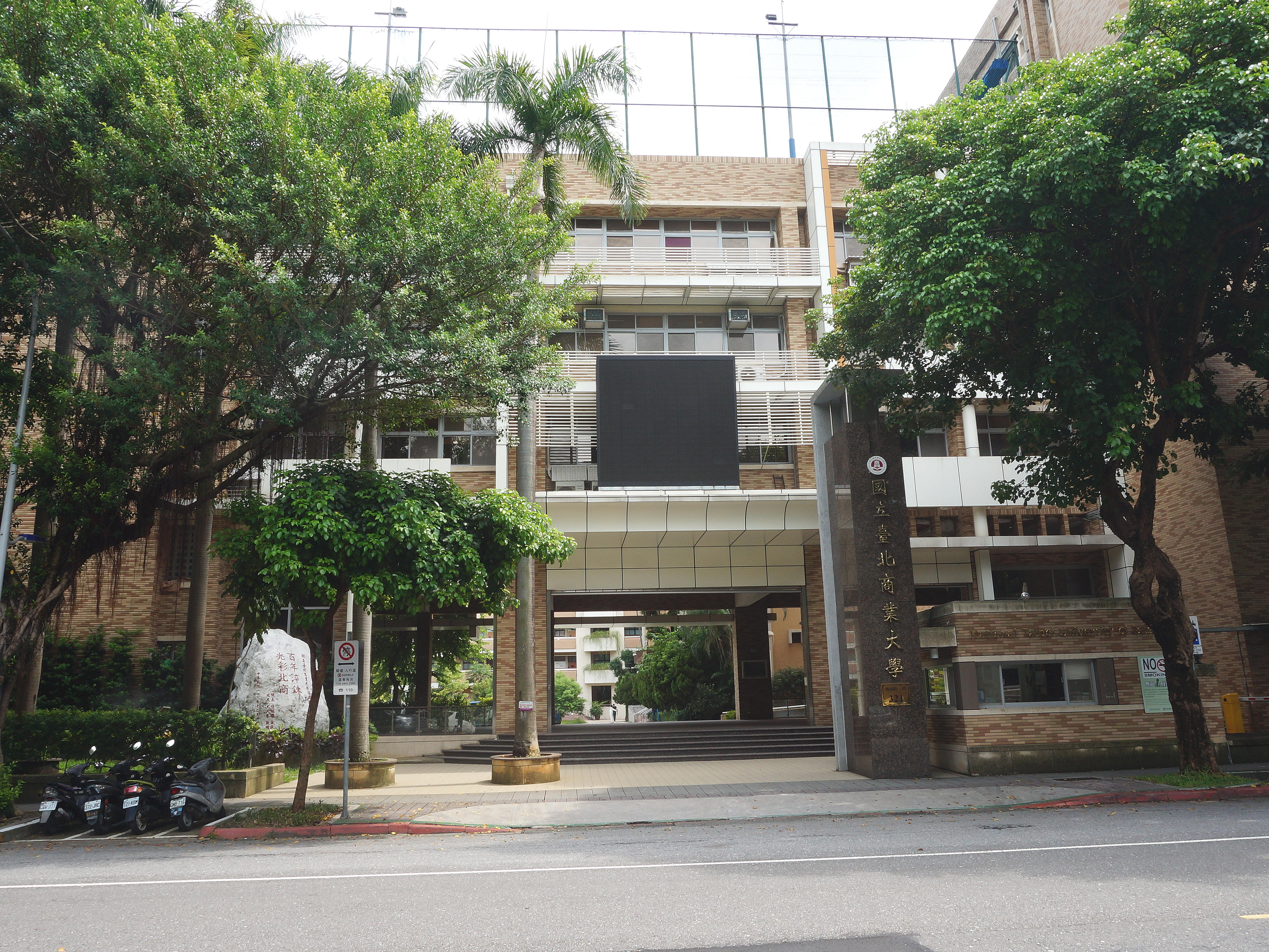 中文（台灣）: 國立臺北商業大學臺北校本部正門。